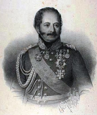 Porträtlithographie Friedrich Graf von Kielmansegg (+ 1851)